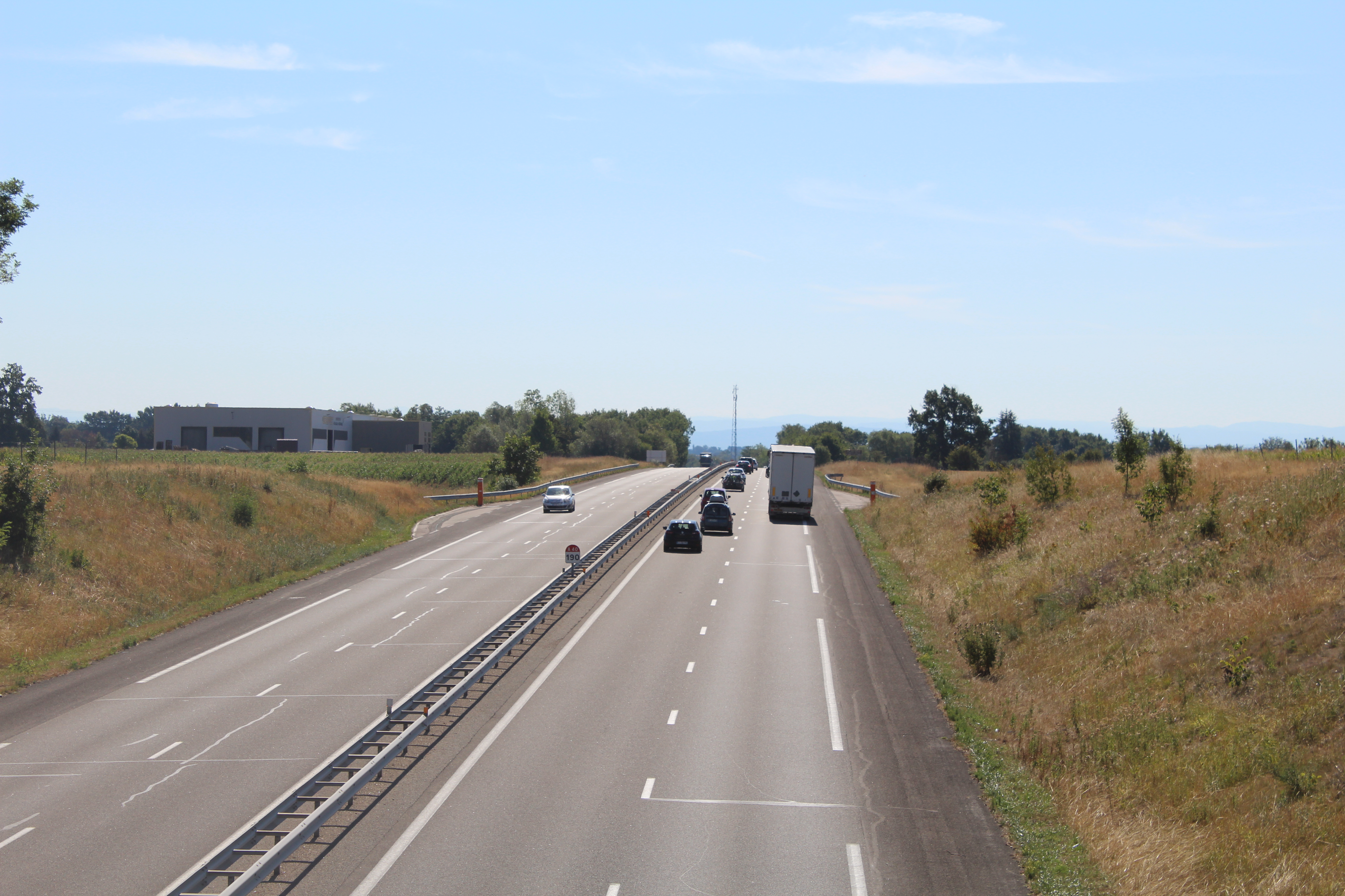 Autoroute A40 à Saint-Genis-sur-Menthon avec à gauche de la photo la zone d'activités du village